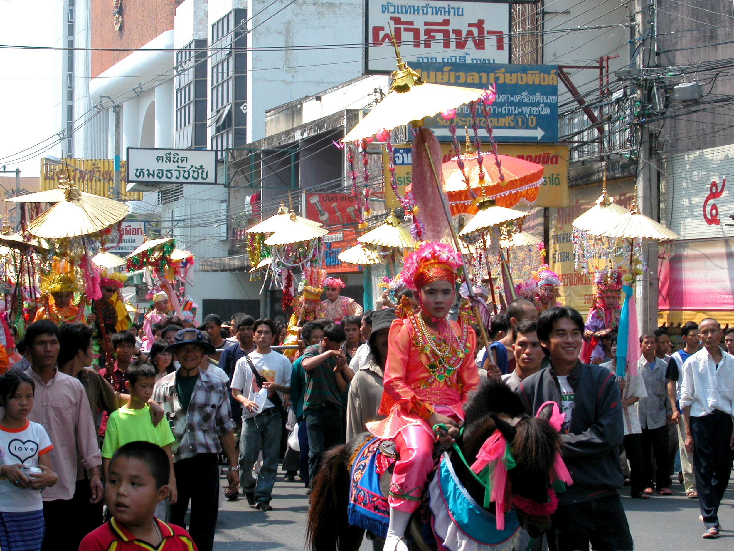 Jaarlijks in maart of april is er het Poy Sang Long Festival, waar jongens in de leeftijd 7-14 jaar als prinsjes worden rondgedragen. Dit kan op schouders of op een pony.